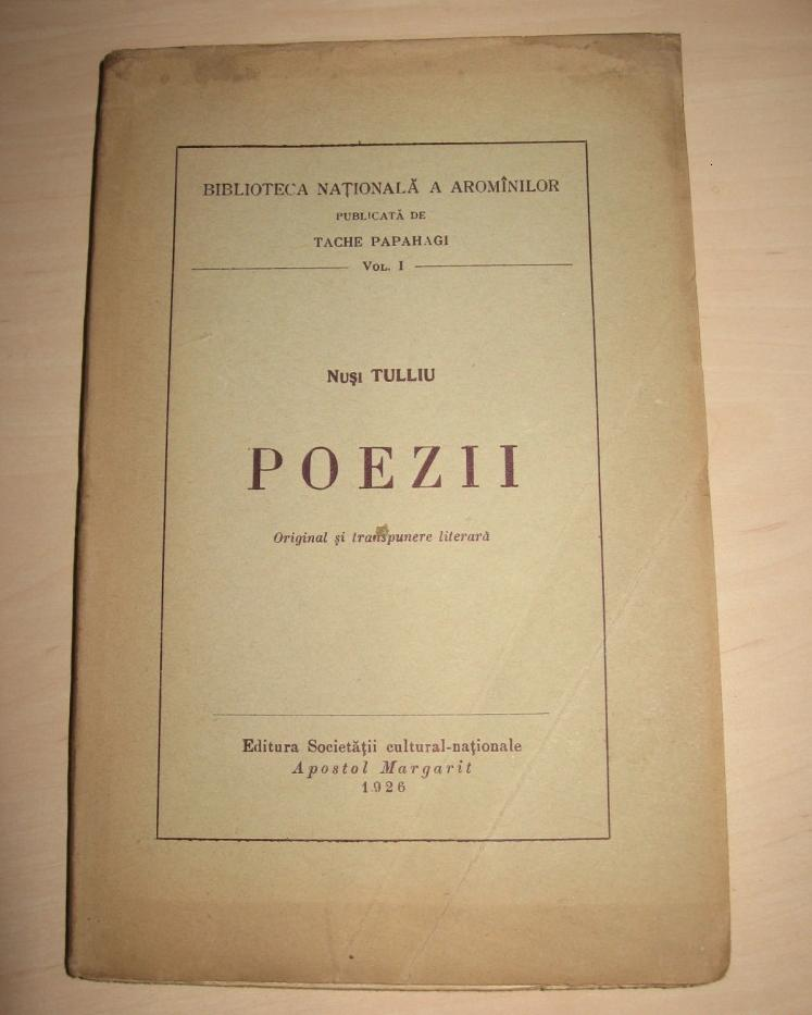 Нуши Тулиу "Поезия", 1926